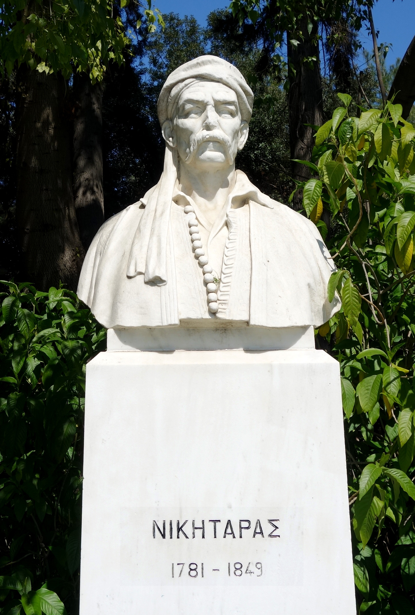 Άγαλμα του Νικηταρά (έργο του Γρηγορίου Ζευγώλη - 1937 ) στο Πεδίον το Άρεως.